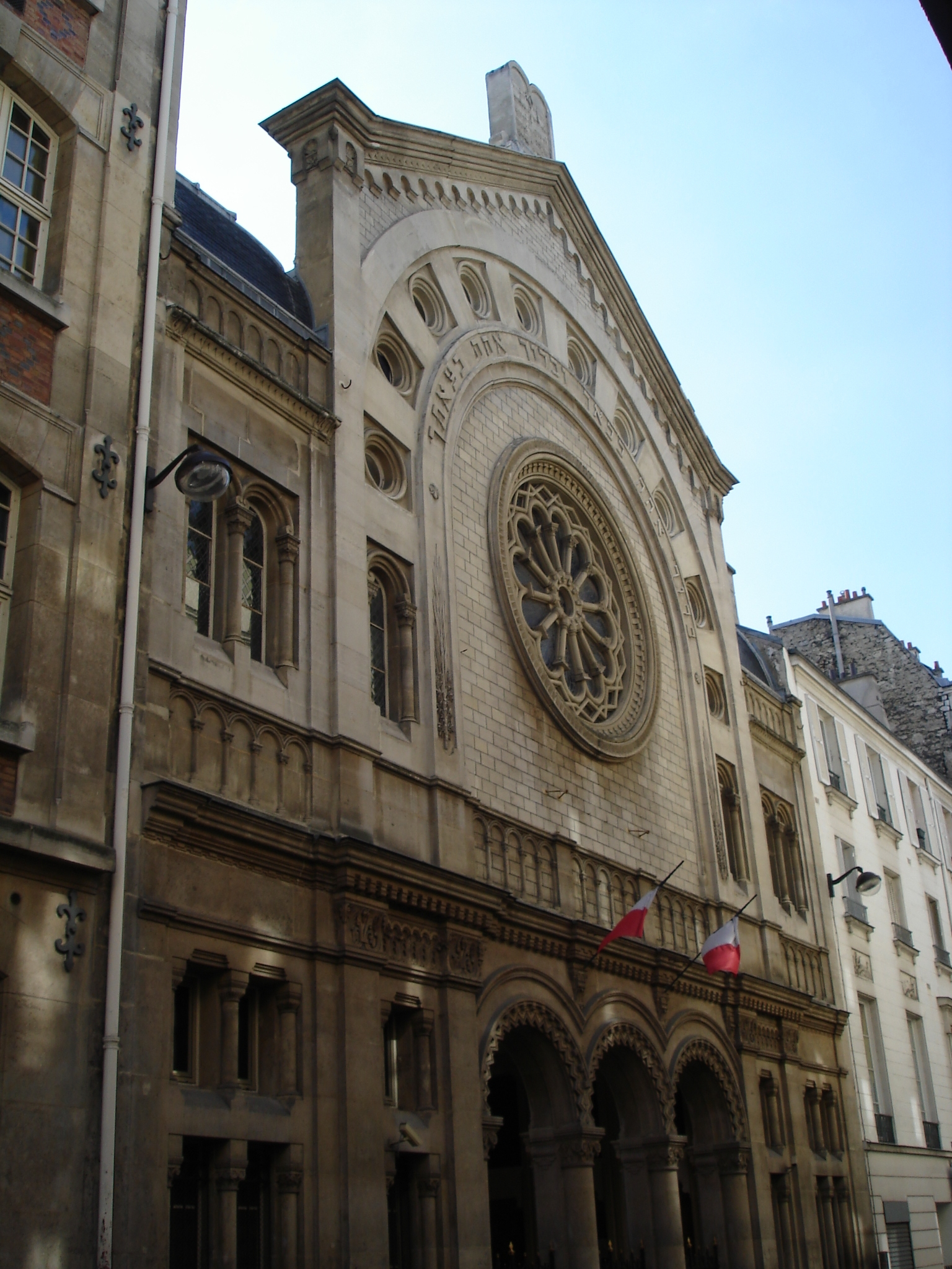 Synagogue de la rue Buffault in Paris (front)